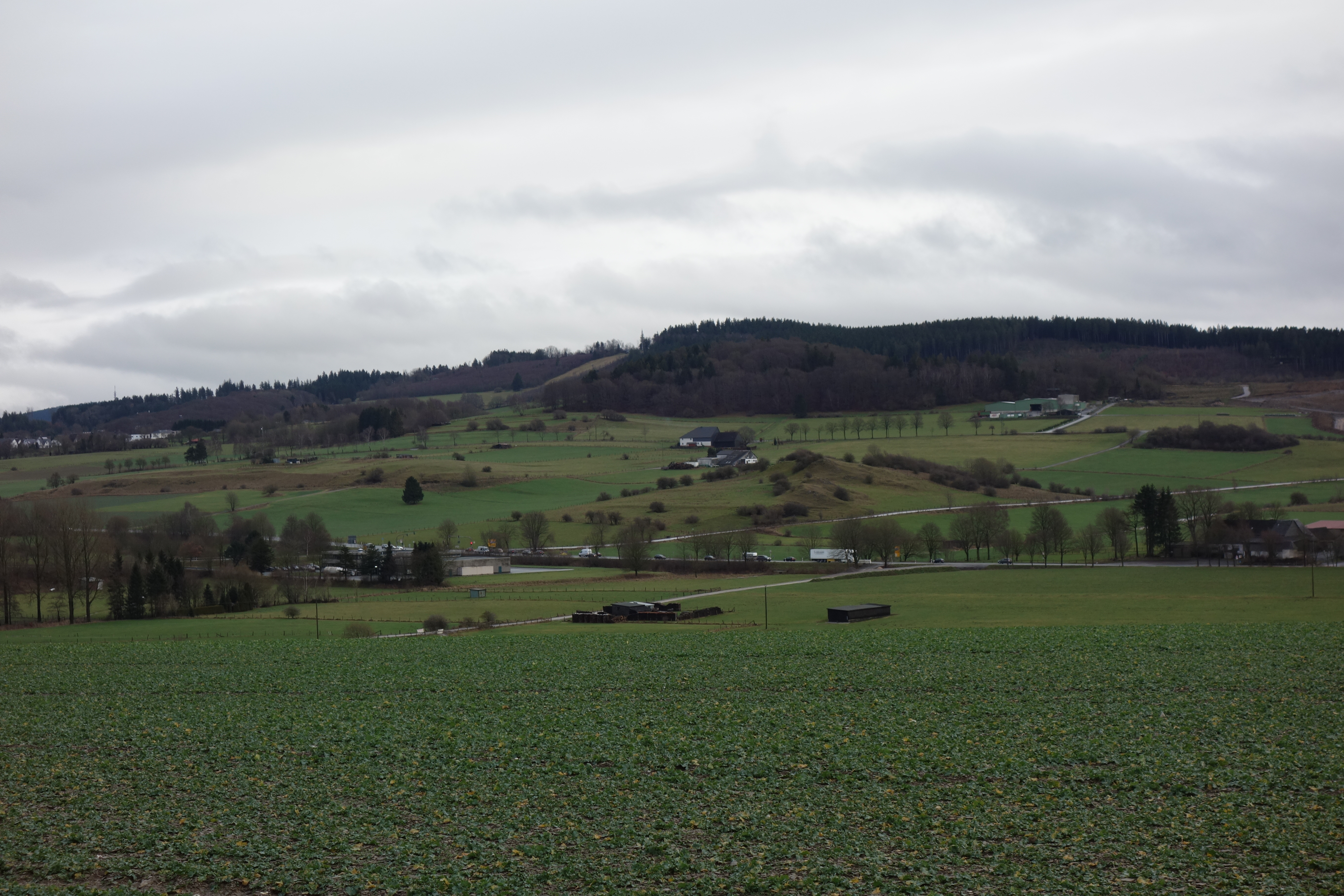 Naturschutzgebiet Weberstein und Naturschutzgebiet Drei Steine mit umgebenden LSG; Wald gehört zum Landschaftsschutzgebiet Briloner Kalkplateau und Randhöhen.